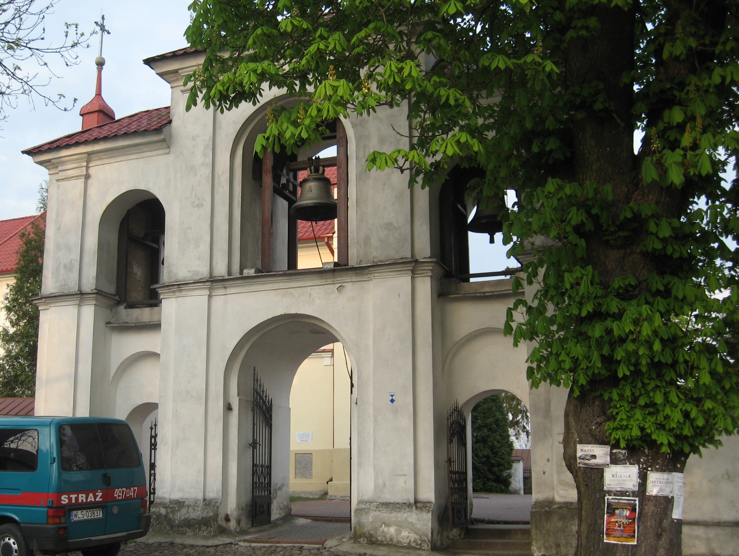 Dzwonnica przy Kościele św. apostołów Piotra i Pawła w Niemojkach